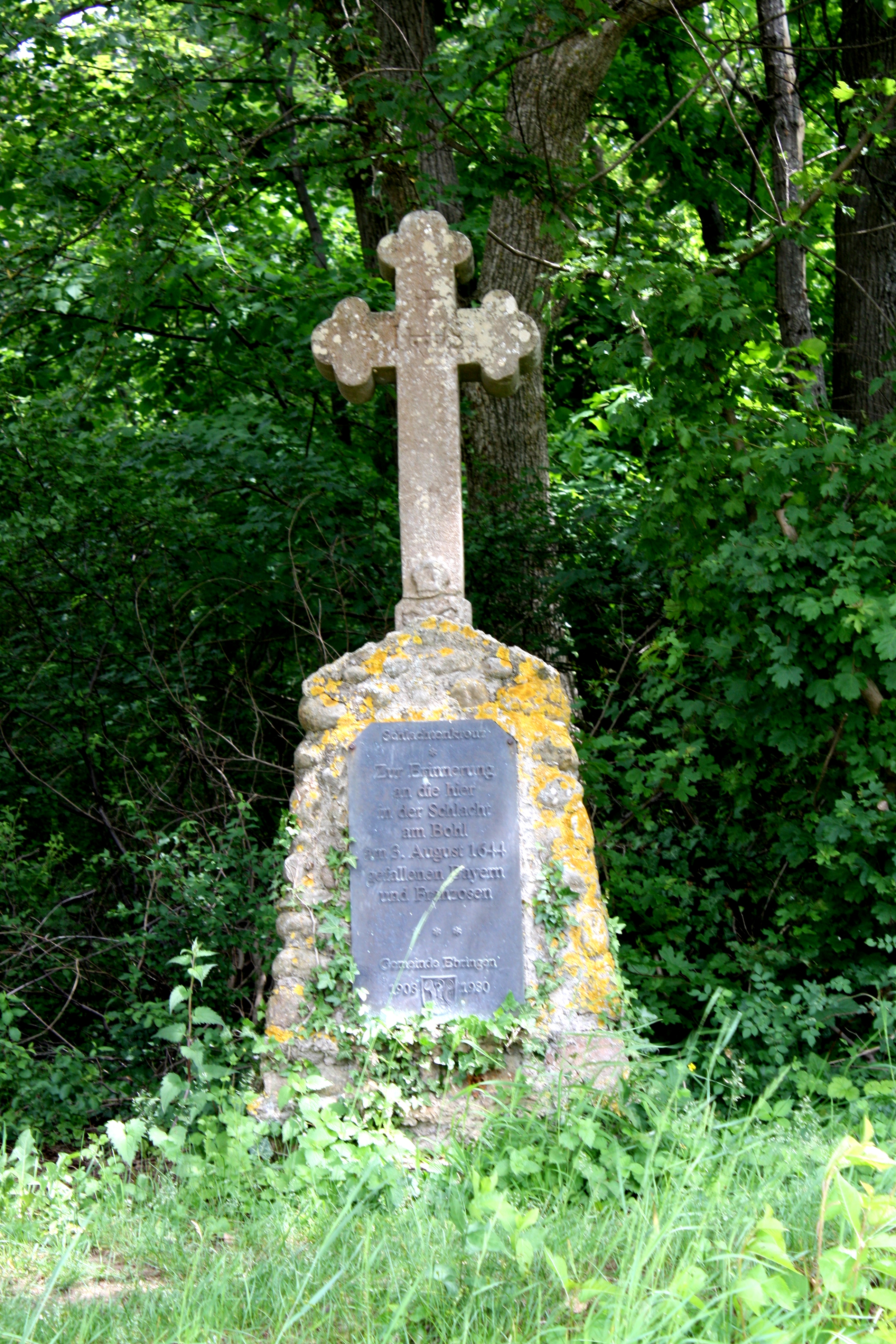 Schlachtenkreuz auf dem Schönberg bei Ebringen. Es erinnert an den ersten Tag (03.08.1644) der Schlacht bei Freiburg im Dreißigjährigen Krieg.